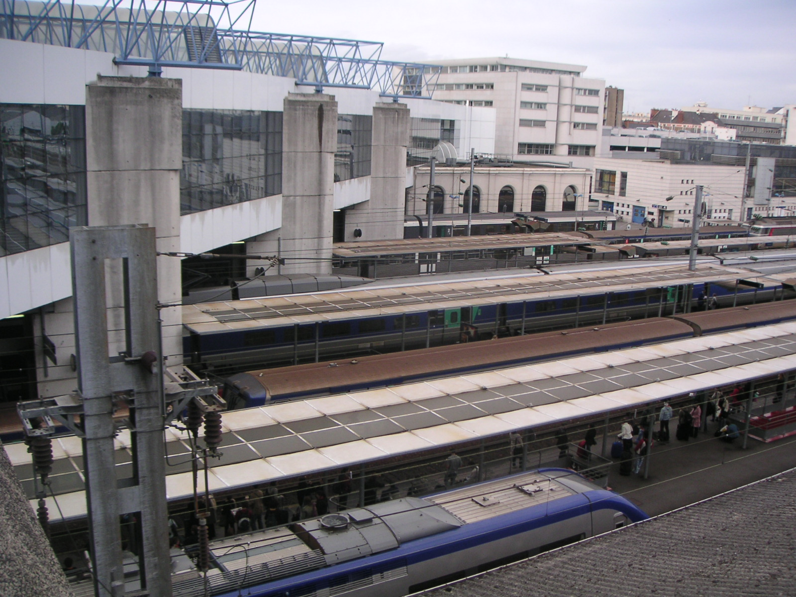 Des trains en attente en gare de Rennes (Ille-et-Vilaine, Bretagne, France).